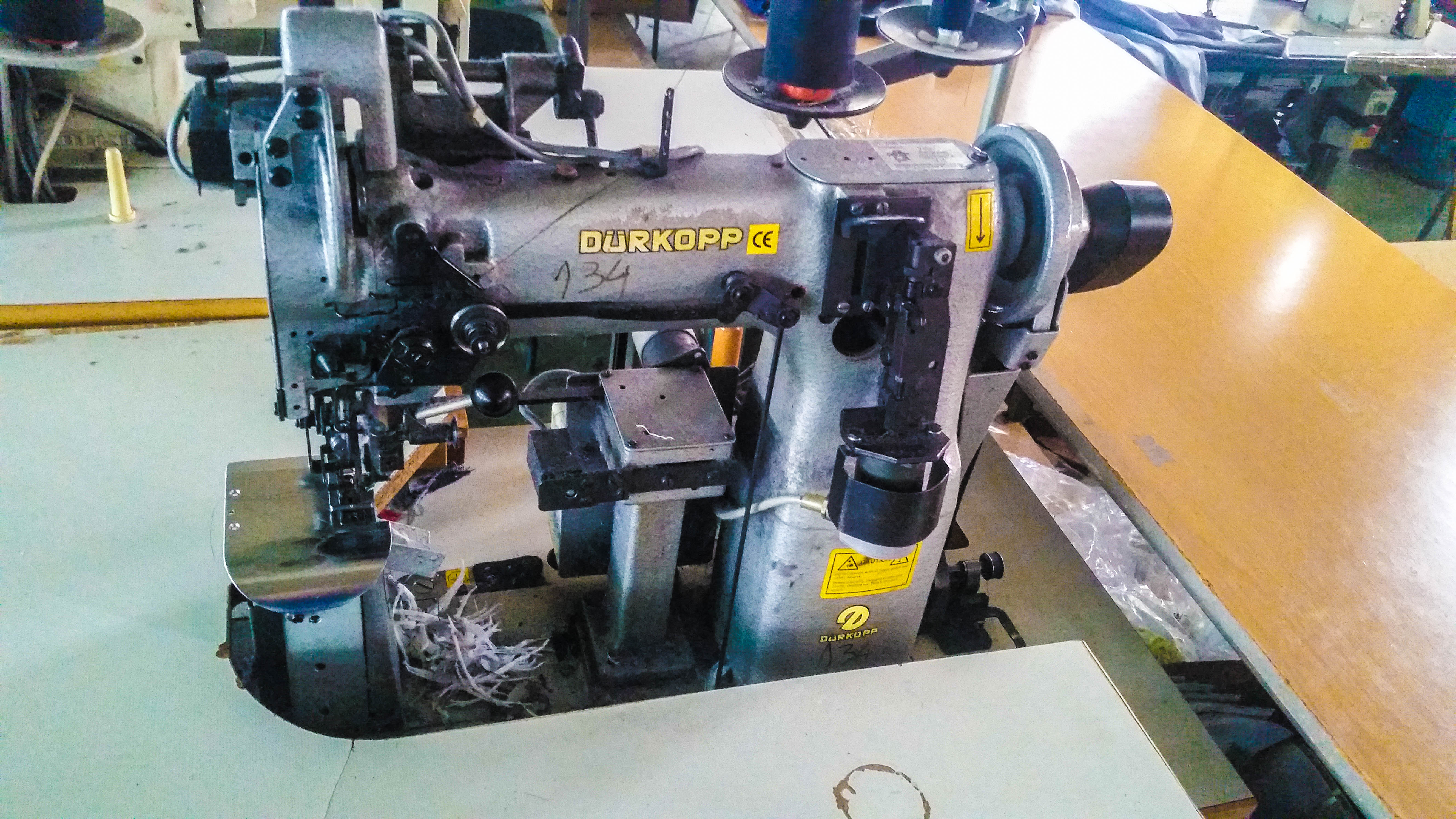 Индустриска машина за шиење Dürkopp